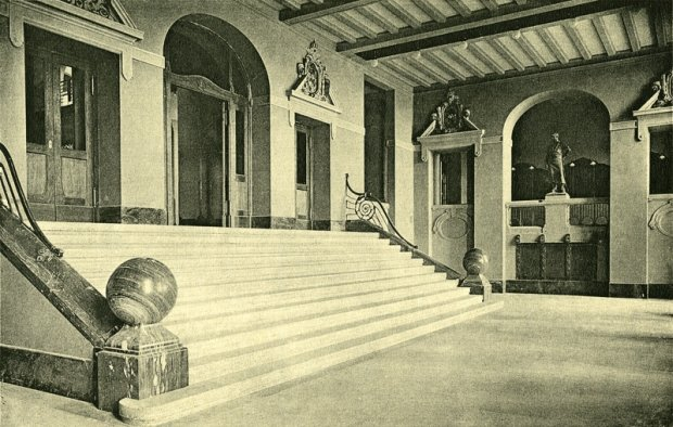 Politechnika Gdańska, parter Gmachu Głównego.